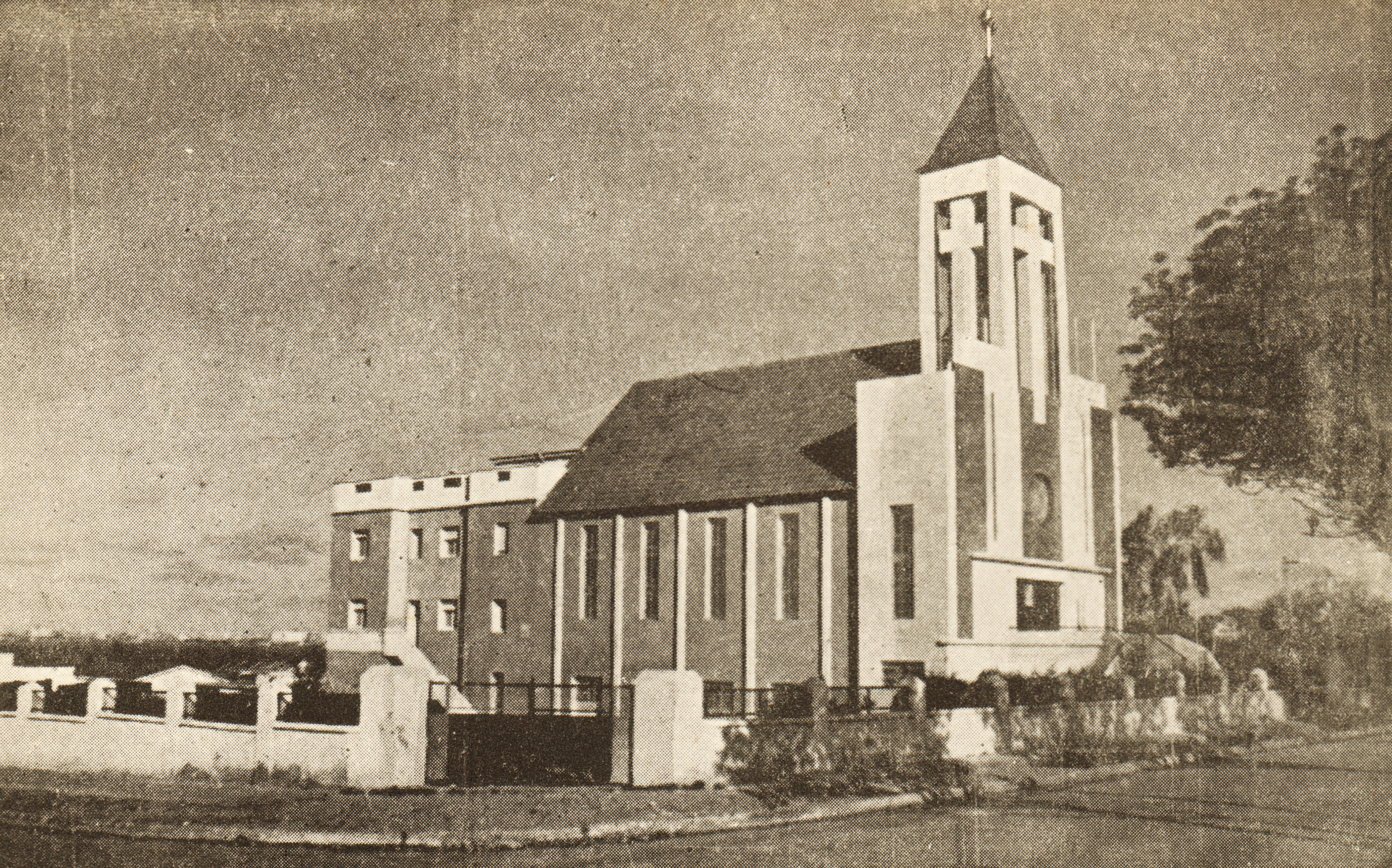 Parroquia Nuestra Señora de Fátima